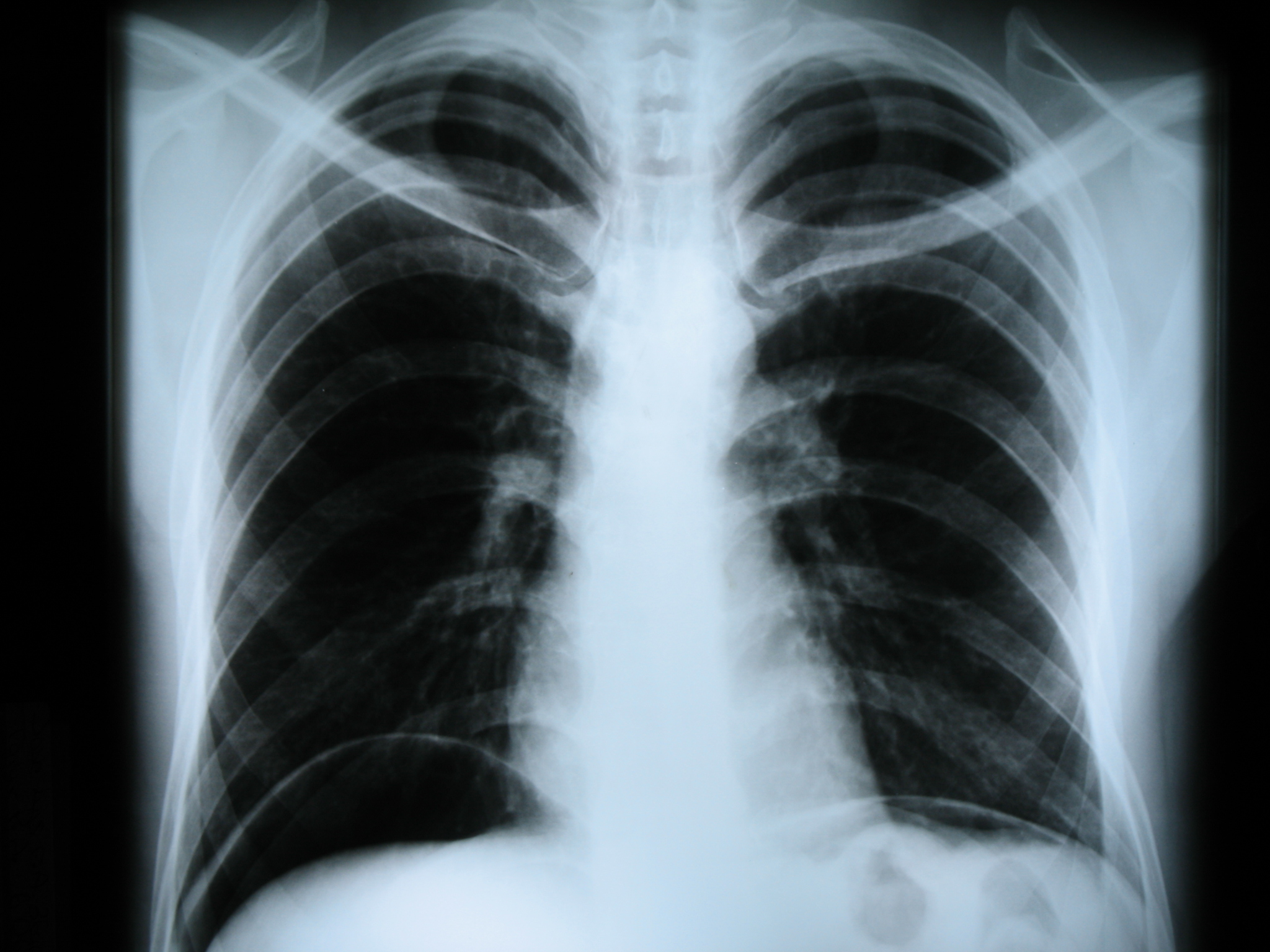 Úlcera gástrica perforada. Radiografia posteroanterior de tórax que muestra imagen de aire subdiafragmático.